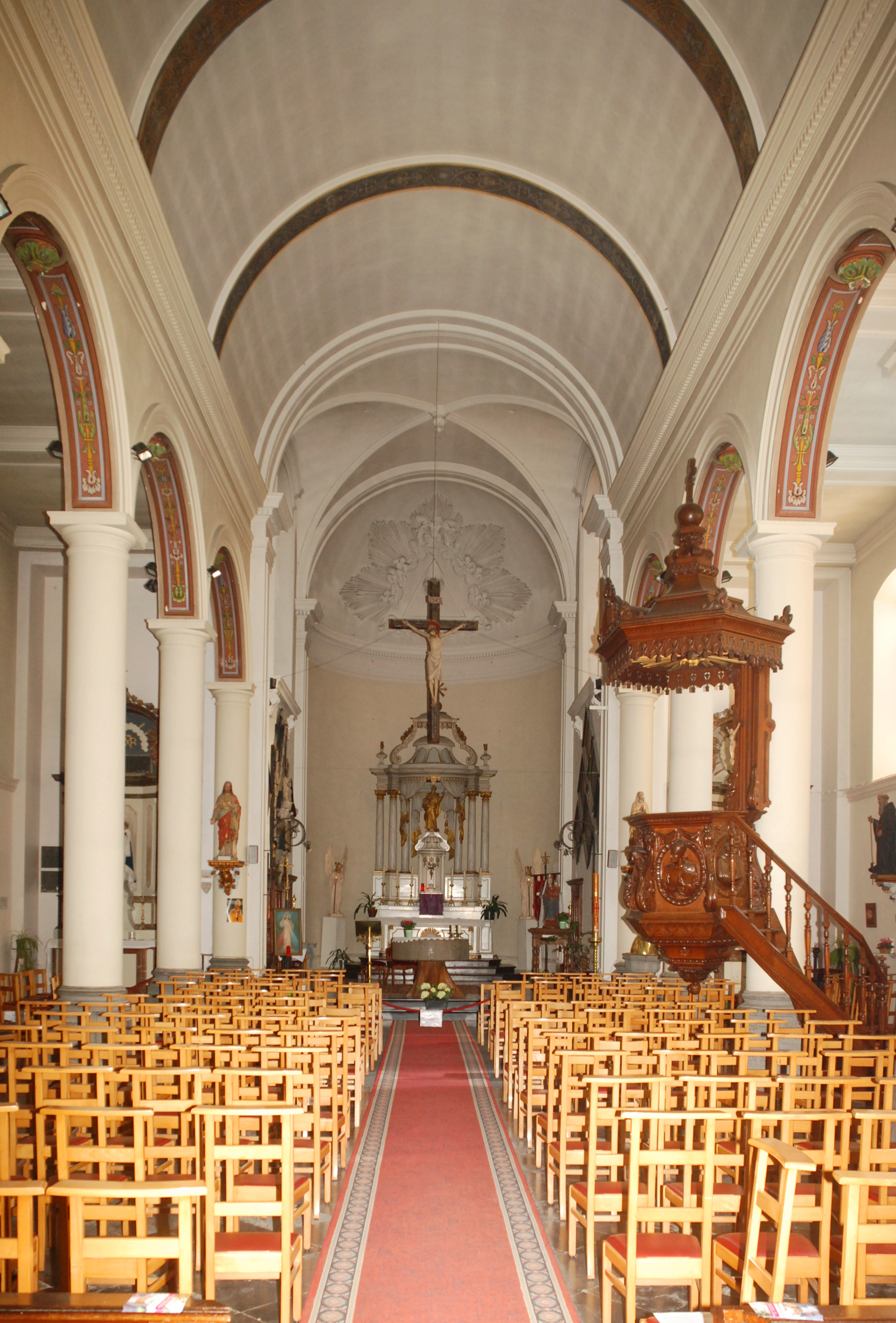 Belgique - Église Saint-Barthélémy de Bousval